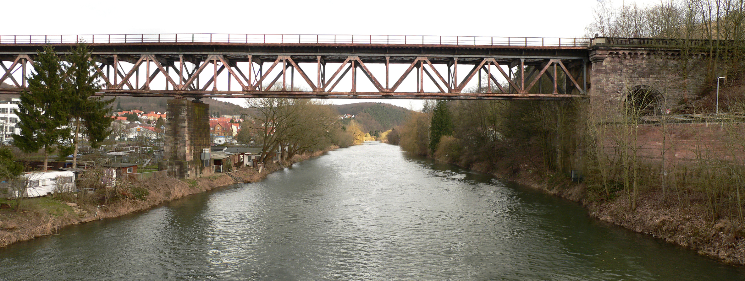 Die 1855 fertiggestellte und etwa 110 Meter lange Werrabrücke der Dransfelder Rampe in Hann. Münden, nach Kriegsschäden wurde der Oberbau 1949 erneuert.